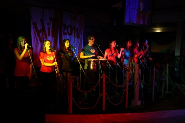 Gwiazda Festiwalu HiT 2011 - "Wołosatki"